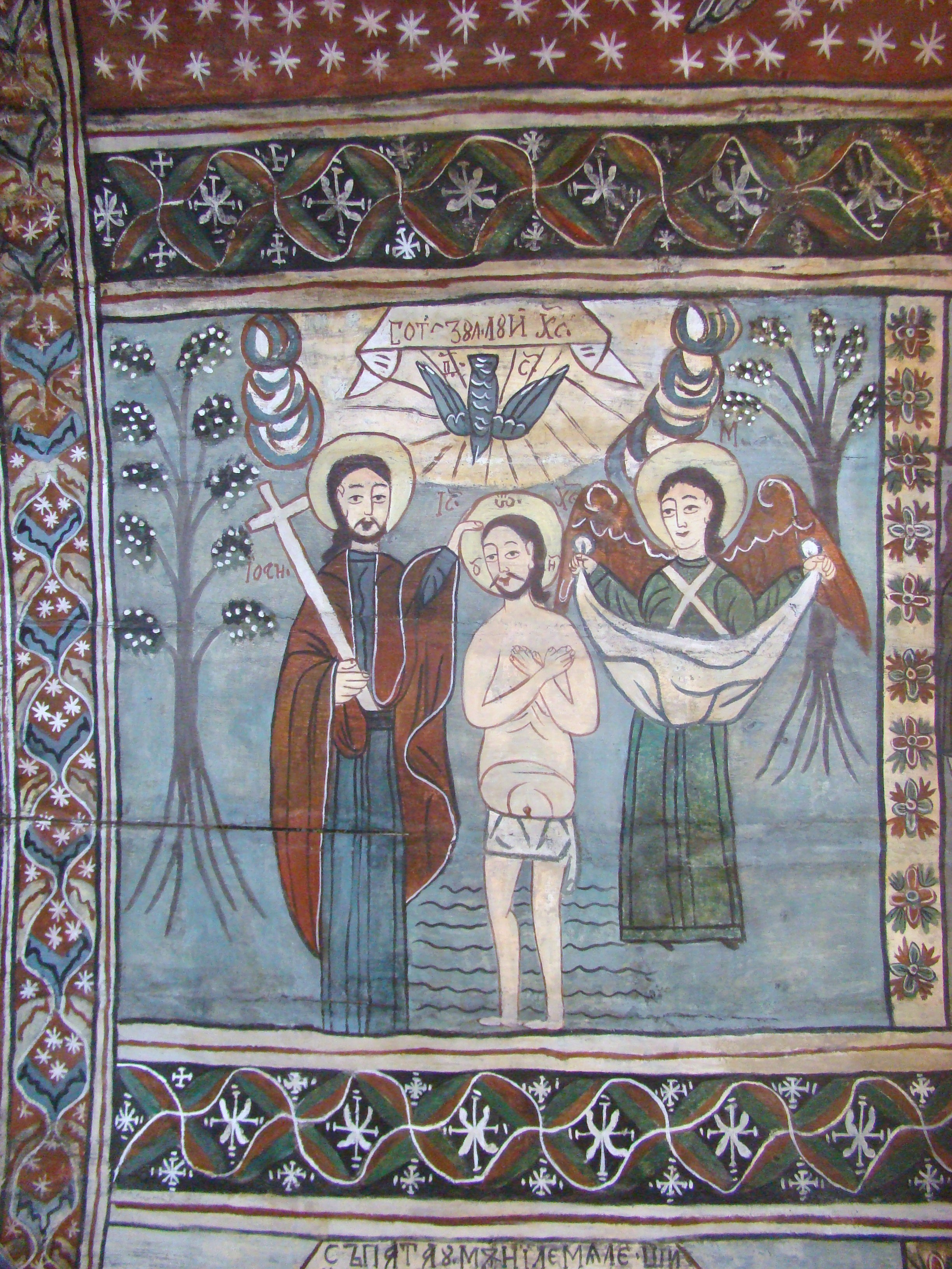 Biserica de lemn „Sf. Arhangheli Mihail şi Gavriil" din Tăuți, județul Cluj